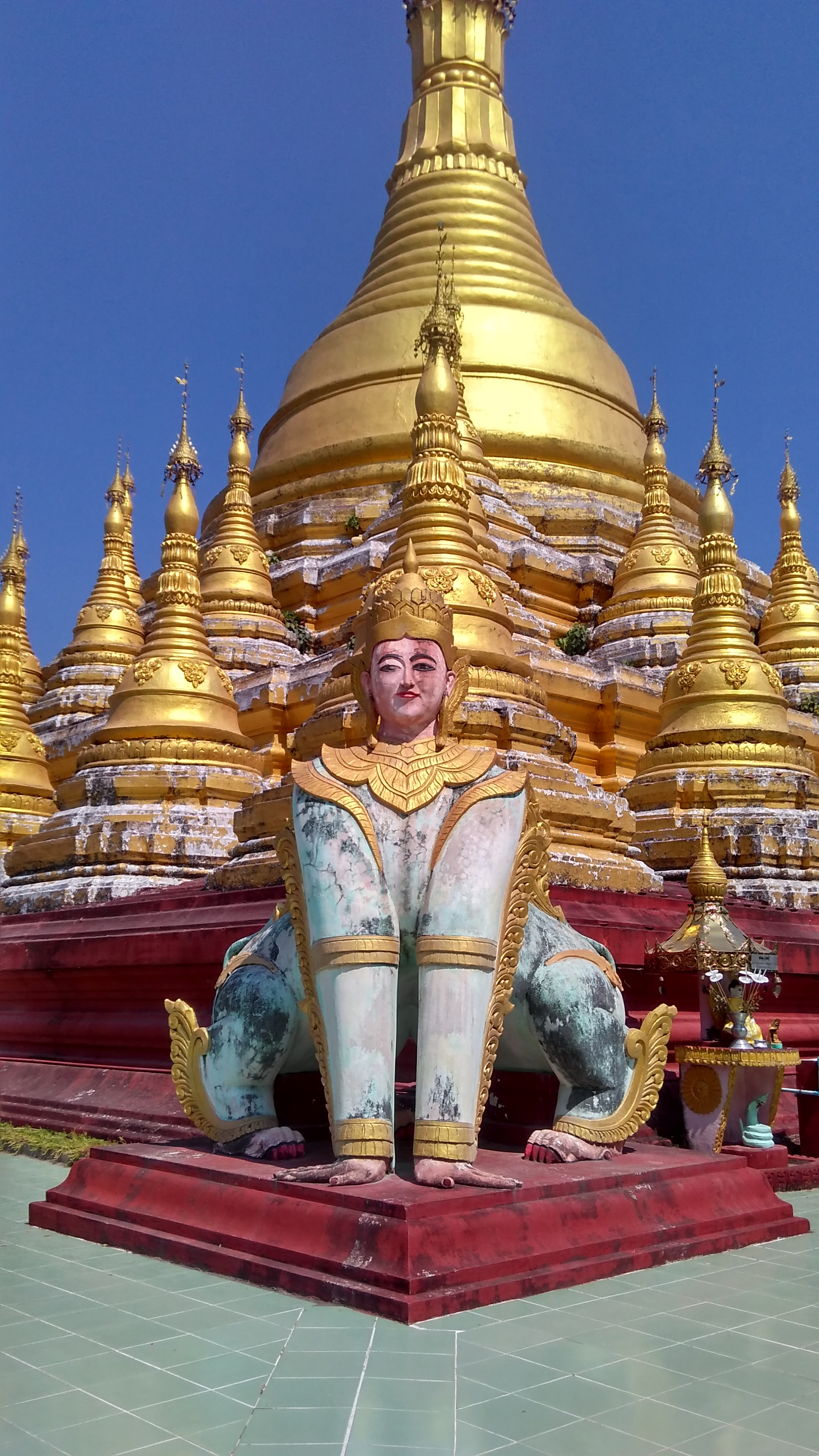 မြန်မာဘာသာ: မြတ်စောညီနောင်စေတီတော်။ ပဲခူးတိုင်းဒေသကြီး၊ တောင်ငူမြို့နယ်တွင် တည်ရှိသည်။